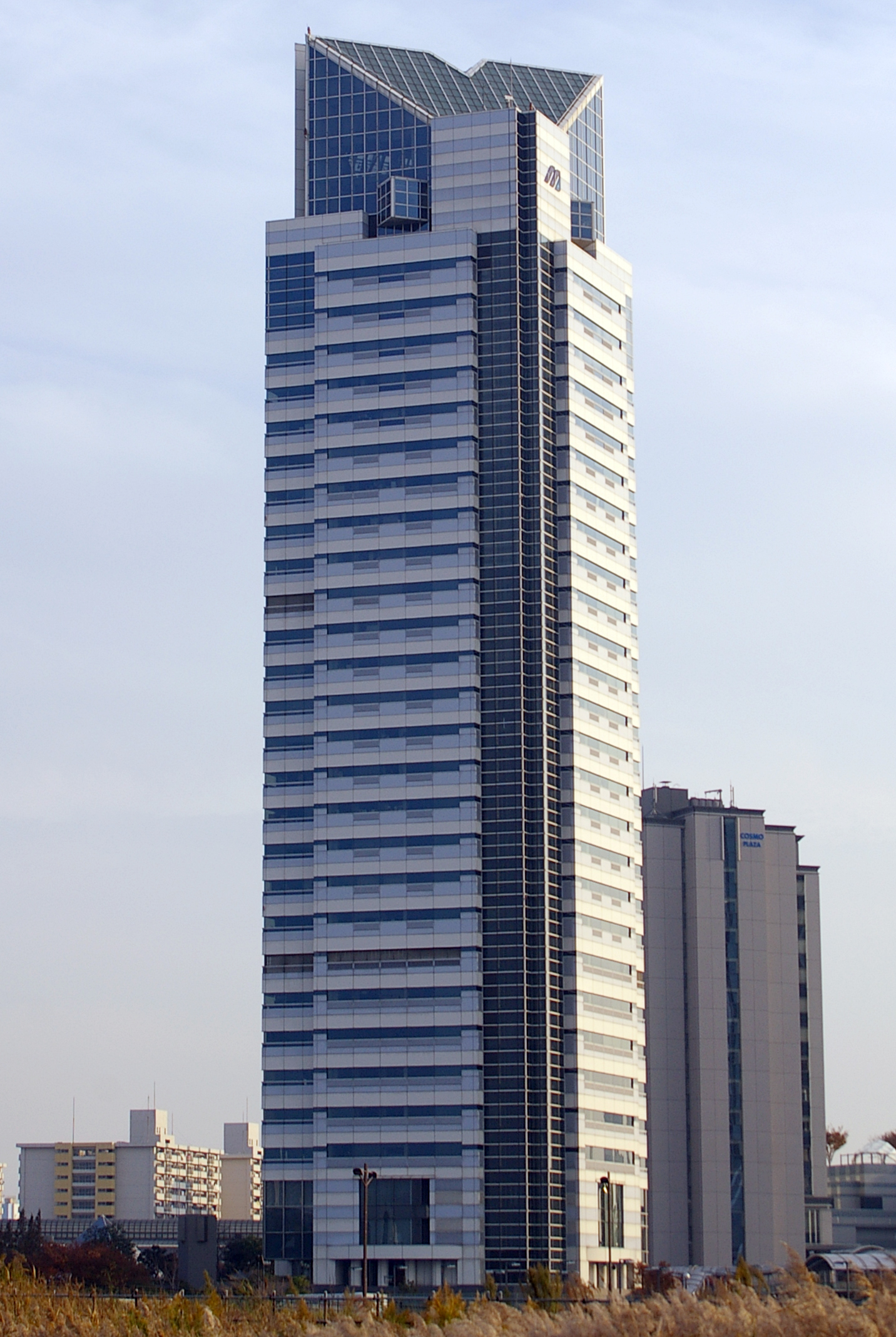 Photograph of Mizuno Crista, Mizuno Corporation Osaka Head Office, in Suminoe-ku, Osaka, Osaka Prefecture, Japan.